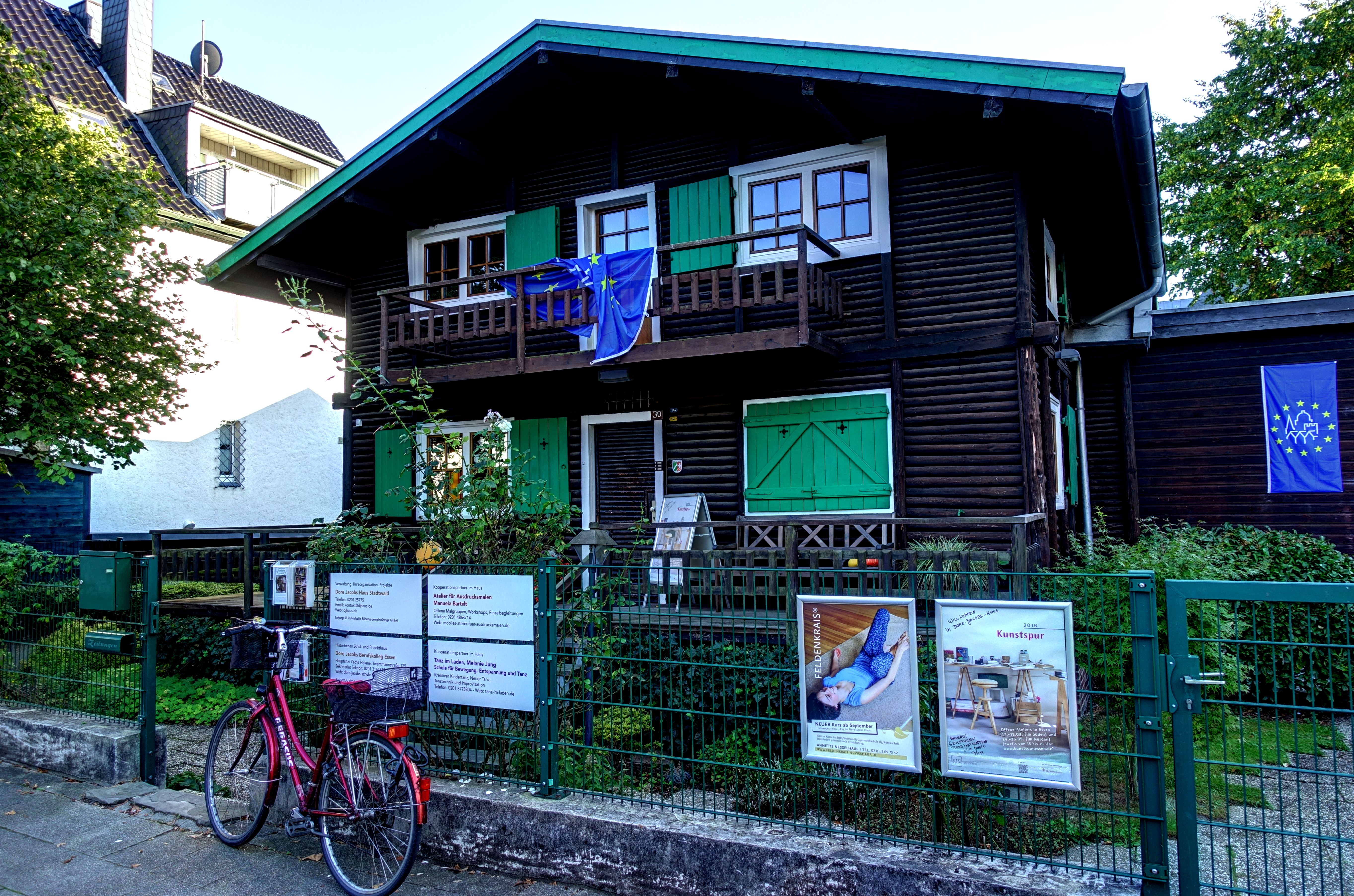 Dore-Jacobs-Schule, Leveringstraße 30, Essen-Stadtwald This is a photograph of an architectural monument.